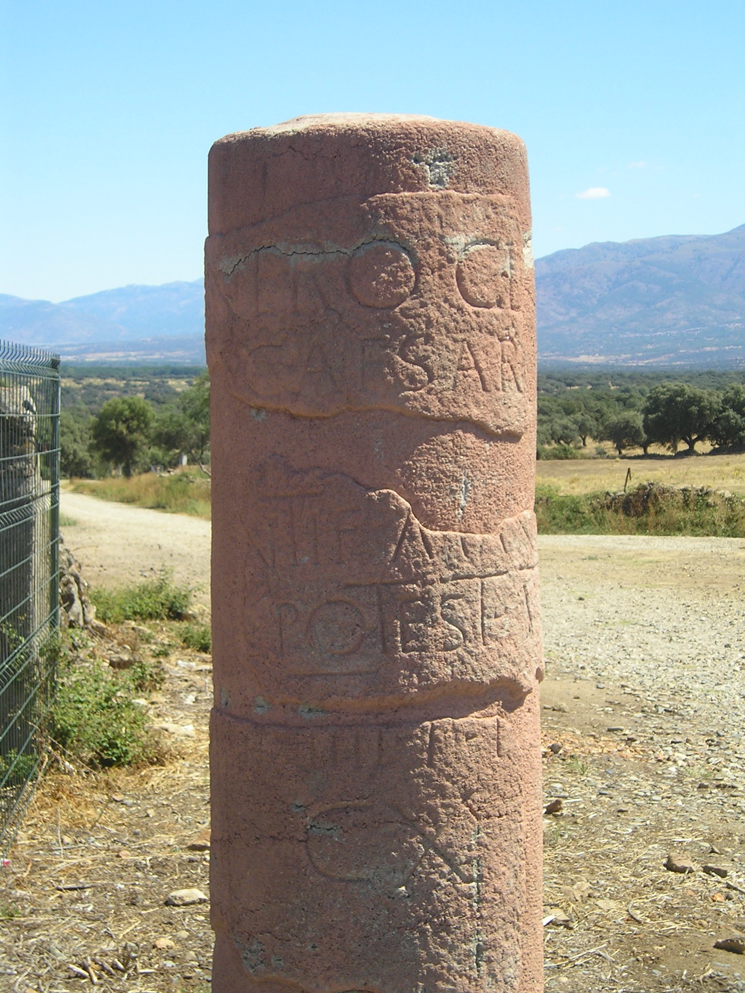 AE 1967, 198. Miliario de Nerón del año 58 erigido a la salida del Municipio romano de Cápara (Cáceres, España) a 110 millas romanas de Emerita Augusta, cuyo texto dice: NERO· CL[AVDIVS]/ CAESAR [AVG(ustus)· GERM(anicus)/ PO]NTIF(ex) MAX(imus)/ [TRIB(unicia)] POTEST(ate) V [CO(n)S(ul) III]/ IMP(erator)· IIII· P(ater)· P(atriae)/ CX.